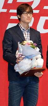 제17회 코카콜라 체육대상 시상식